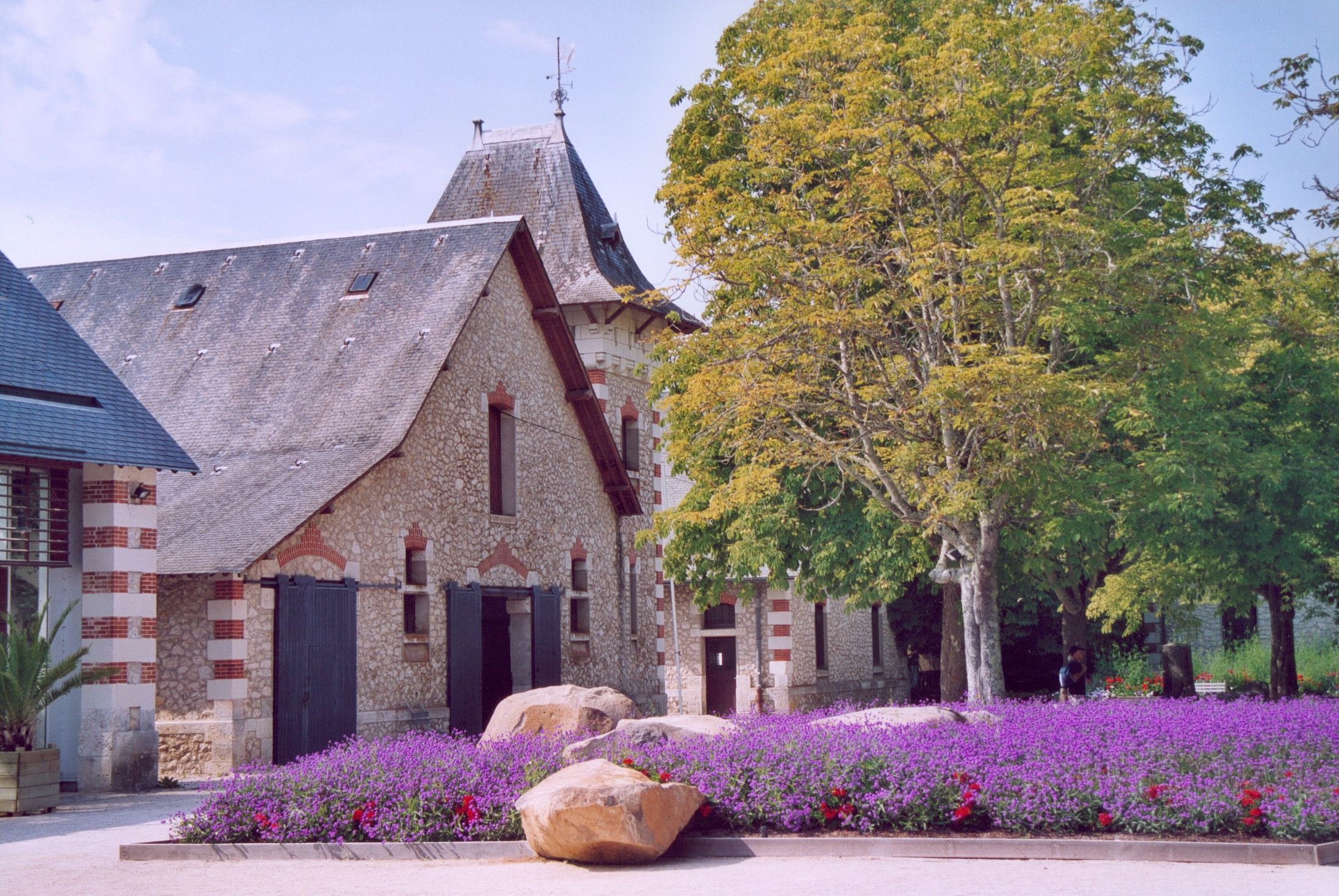 France Loir-et-Cher Chaumont-sur-Loire Jardin Photographie prise par GIRAUD Patrick